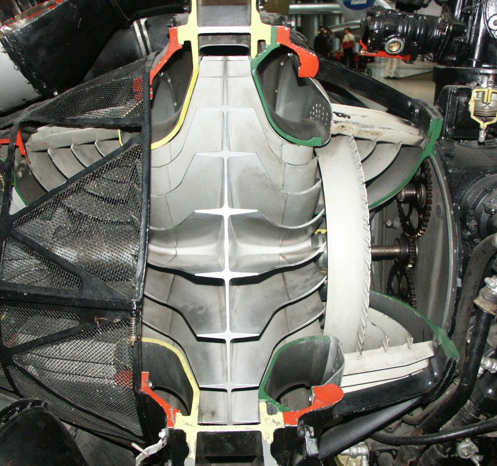 Radialkompressor eines Klimow_WK-1 Strahltriebwerkes. Radialverdichterrotor in Tandembauweise; Einströmung axial beidseitig; Abströmung radial